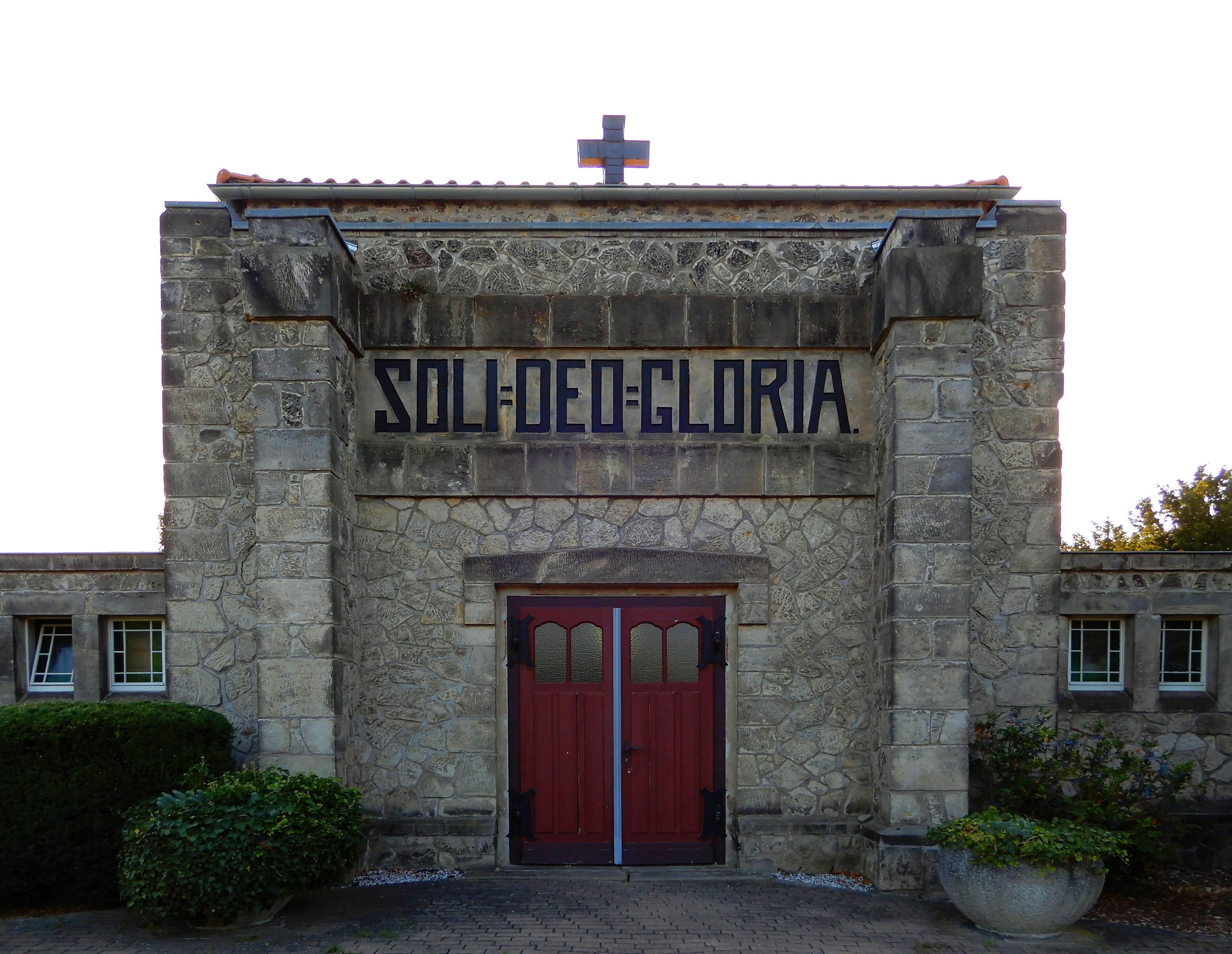 Friedhof Neinstedt